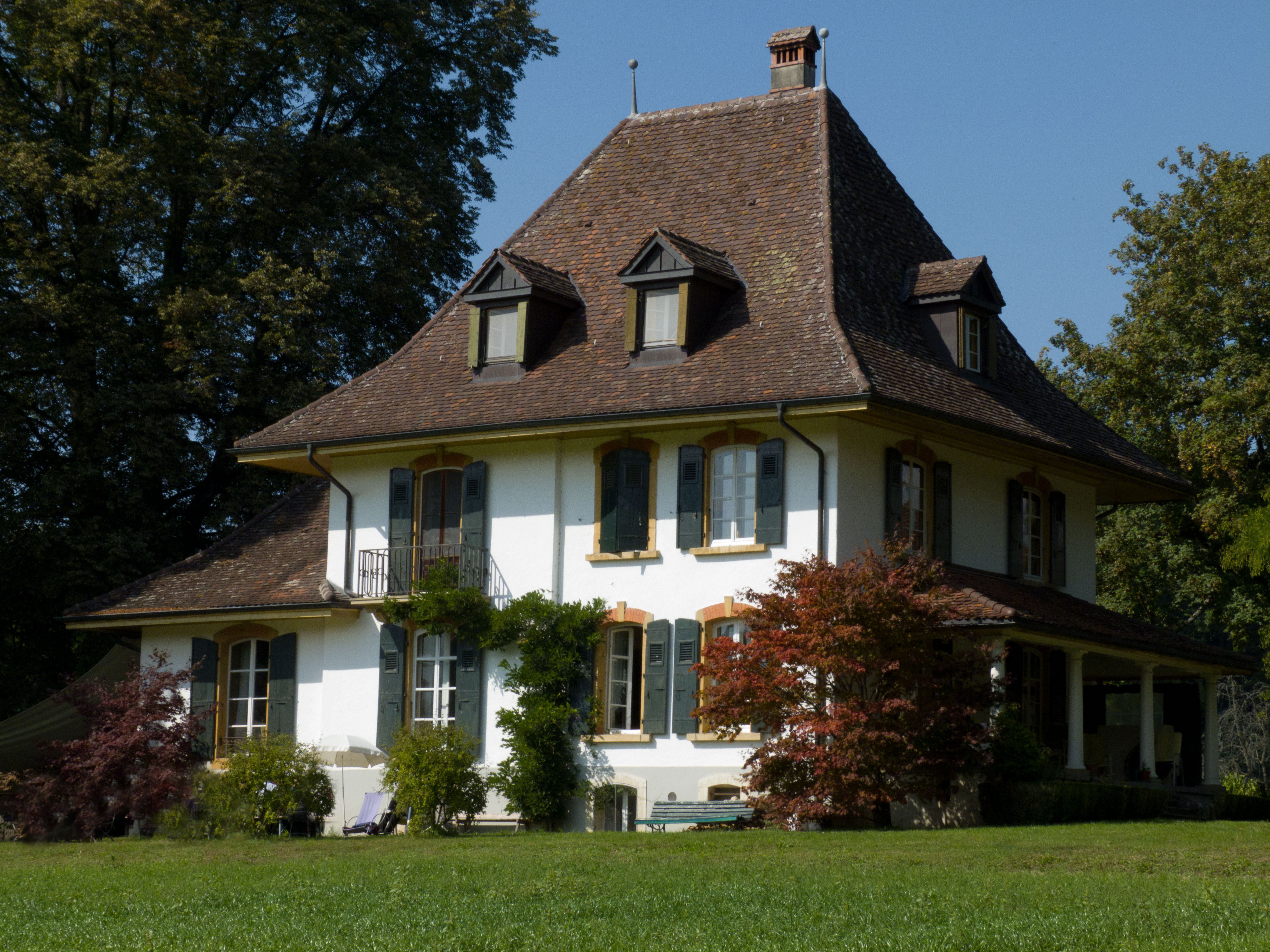 Gals, Jolimontgut, Villa